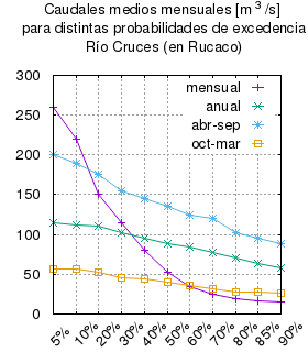 Caudales medios mensuales y anuales por probabilidades de excedencia, en el río Cruces, Valdivia Chile. # Ministerio de Obras Públicas, Dirección General de Aguas, Departamento de Hidrología # Análisis Estadístico de Caudales en los Ríos de Chile. # Regiones X, XI y XII # 1990? # Estación río Cruces en Rucaco # caudales medios por probabilidad de excedencia # pág. 34 prob mensual anual abr-sep oct-mar 5% 260.0 115.0 200.0 57.0 10% 220.0 112.0 190.0 56.0 20% 150.0 110.0 175.0 53.0 30% 115.0 102.0 155.0 46.0 40% 80.0 95.0 145.0 44.0 50% 52.0 89.0 135.0 40.0 60% 34.0 84.0 125.0 36.0 70% 25.0 78.0 120.0 32.0 80% 19.0 70.0 102.0 28.0 85% 17.0 63.0 96.0 27.0 90% 15.0 58.0 89.0 26.0